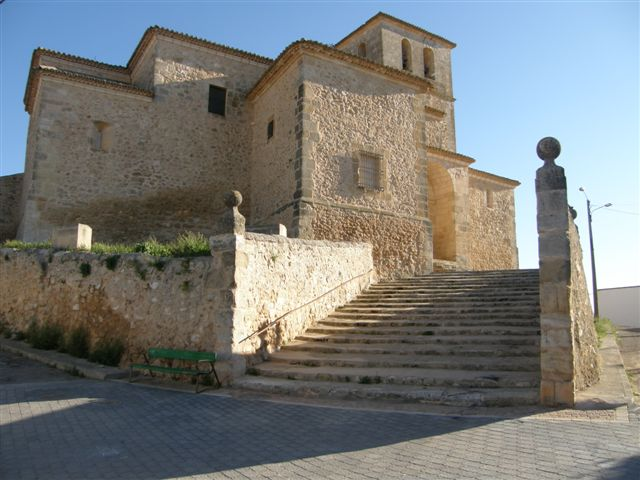 Foto iglesia parroquial de La Almarcha